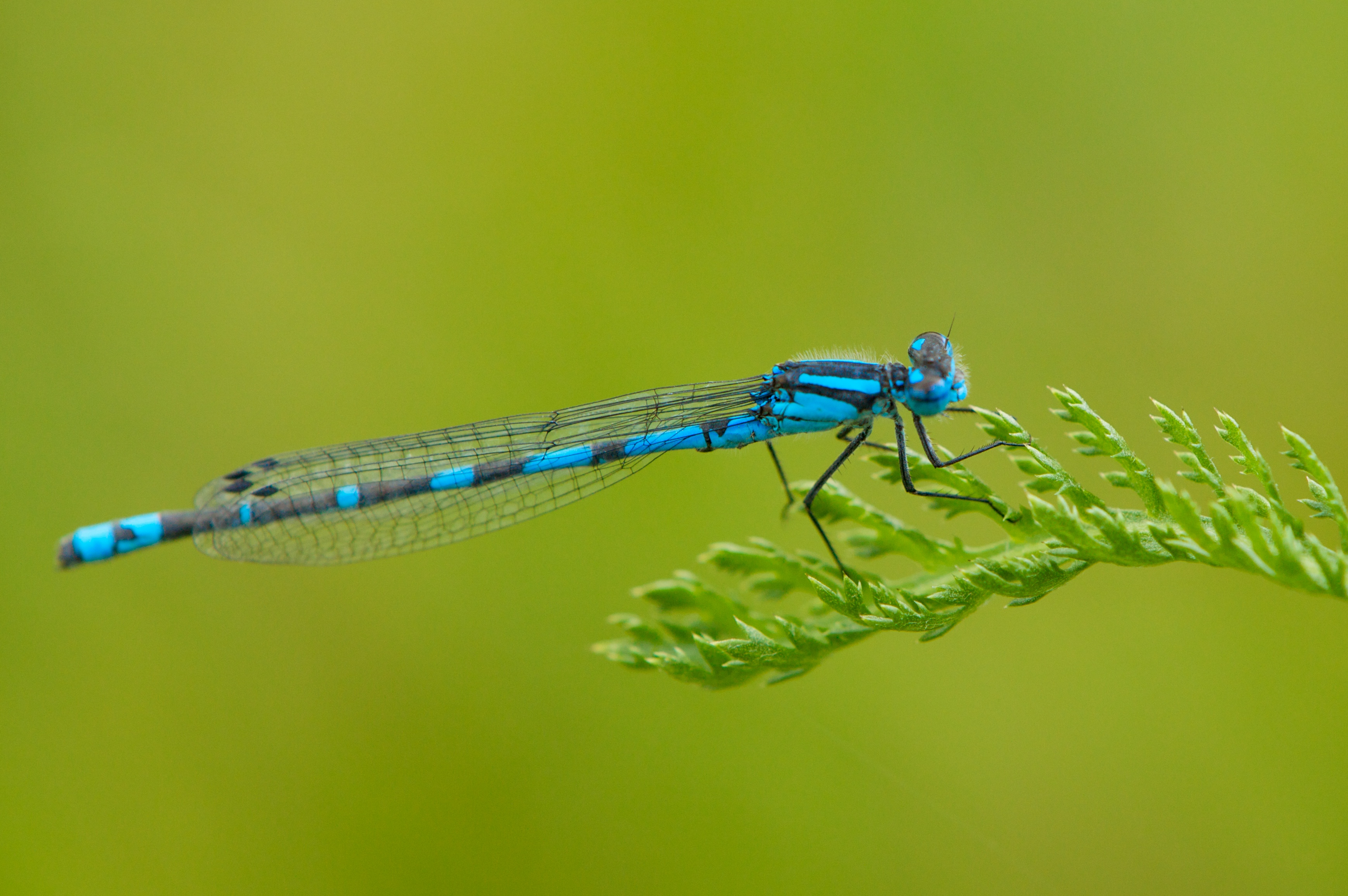 Coenagrion hastulatum, male